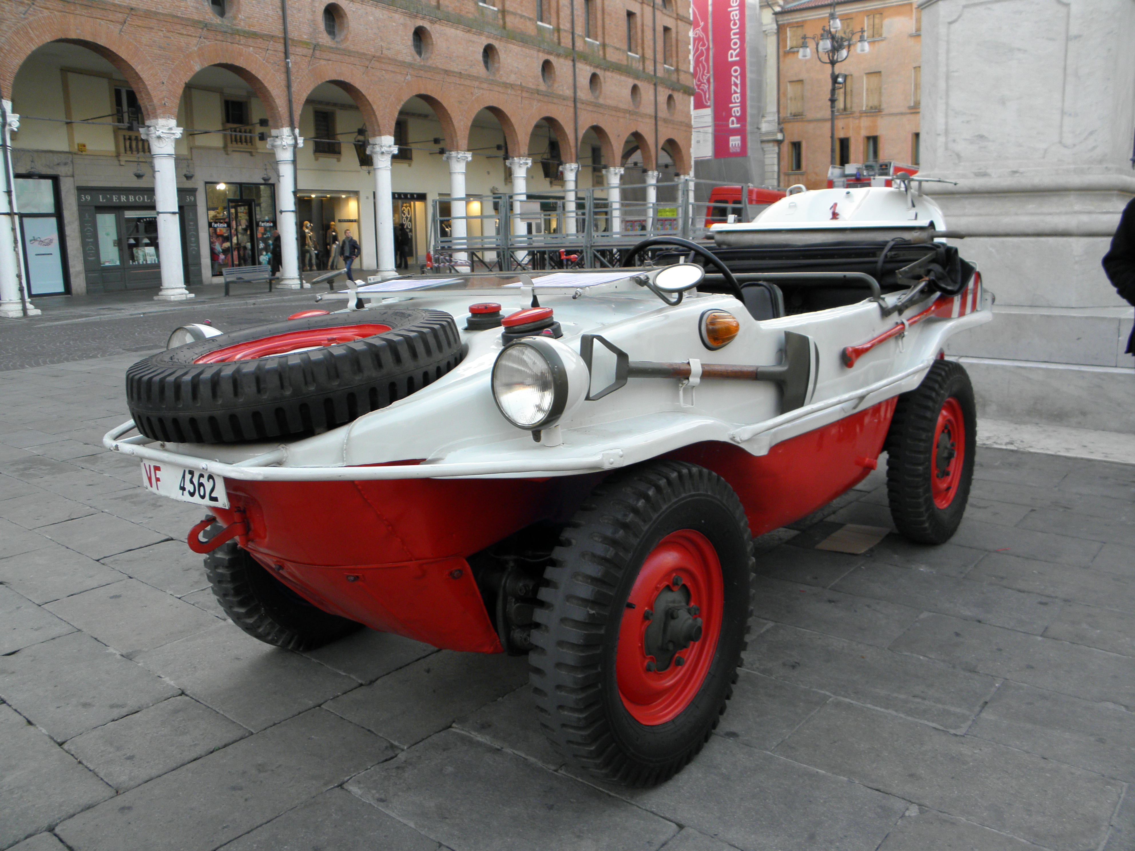 Volkswagen Typ 166 Schwimmwagen, veicolo storico dei Vigili del Fuoco. Foto scattata in occasione della manifestazione svolta a Rovigo il 13 novembre 2011 in ricordo dell'alluvione del Polesine del 1951.